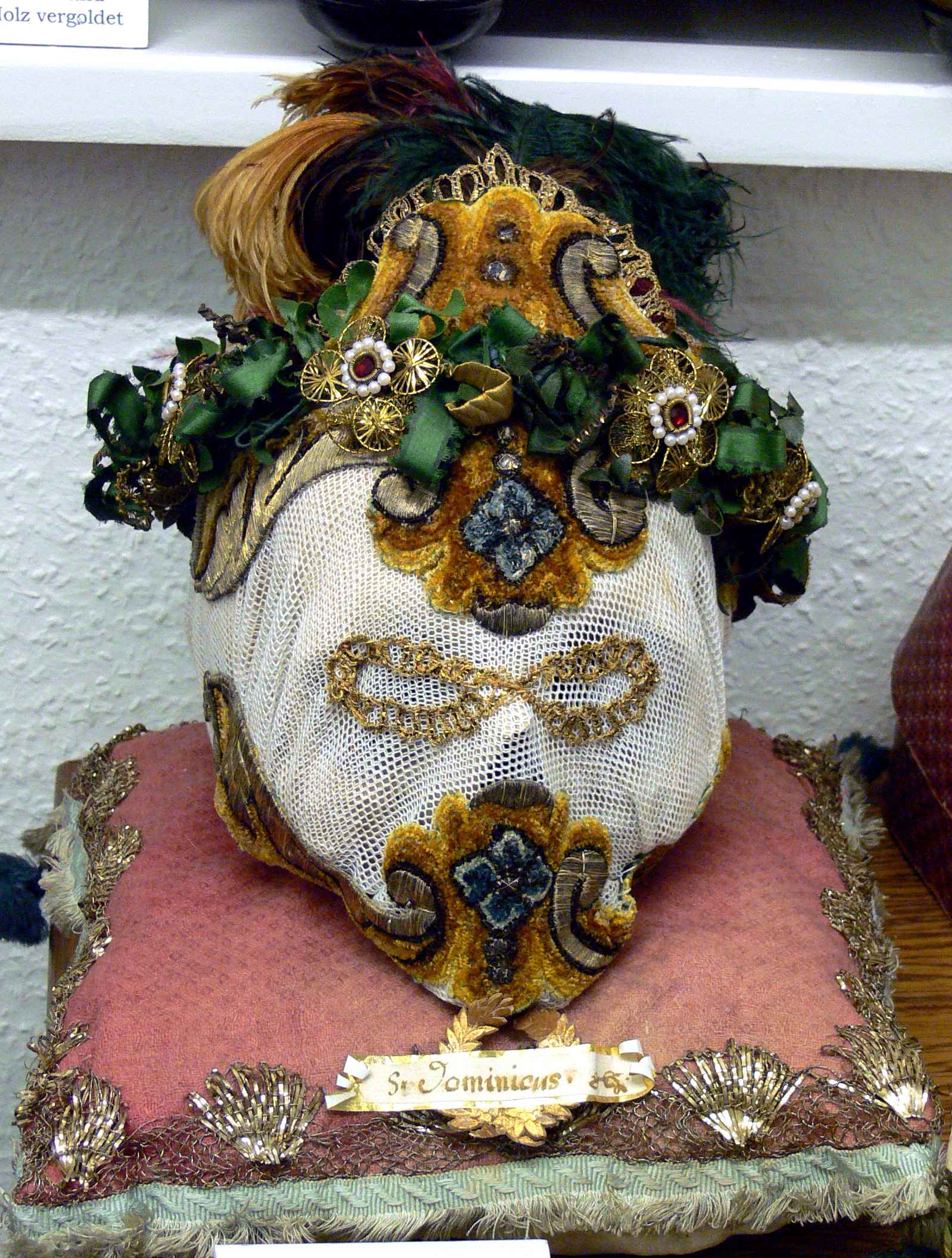 Weingarten, Museum für Klosterkultur Kopfreliquiar eines Katakombenmärtyrers „St. Dominicus“, Chenillornamente, Federn, Drahtarbeiten, Tüll, Posamentenborten; Oberschwaben, 18. Jh. (restauriert)